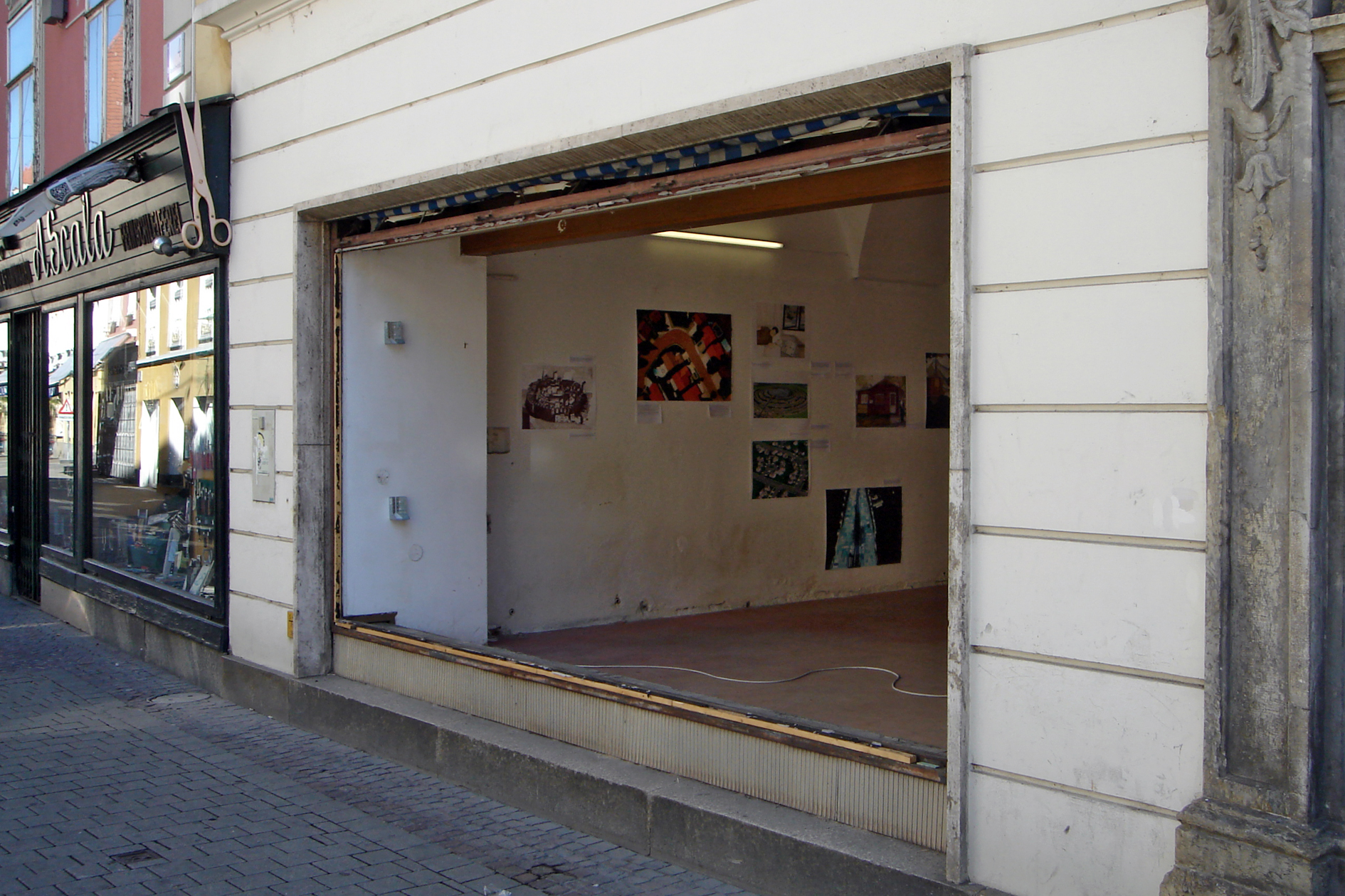 Graz, Steirischer Herbst 2006, traurig sicher, im Training, Palais Thienfeld (Oktober 2006)